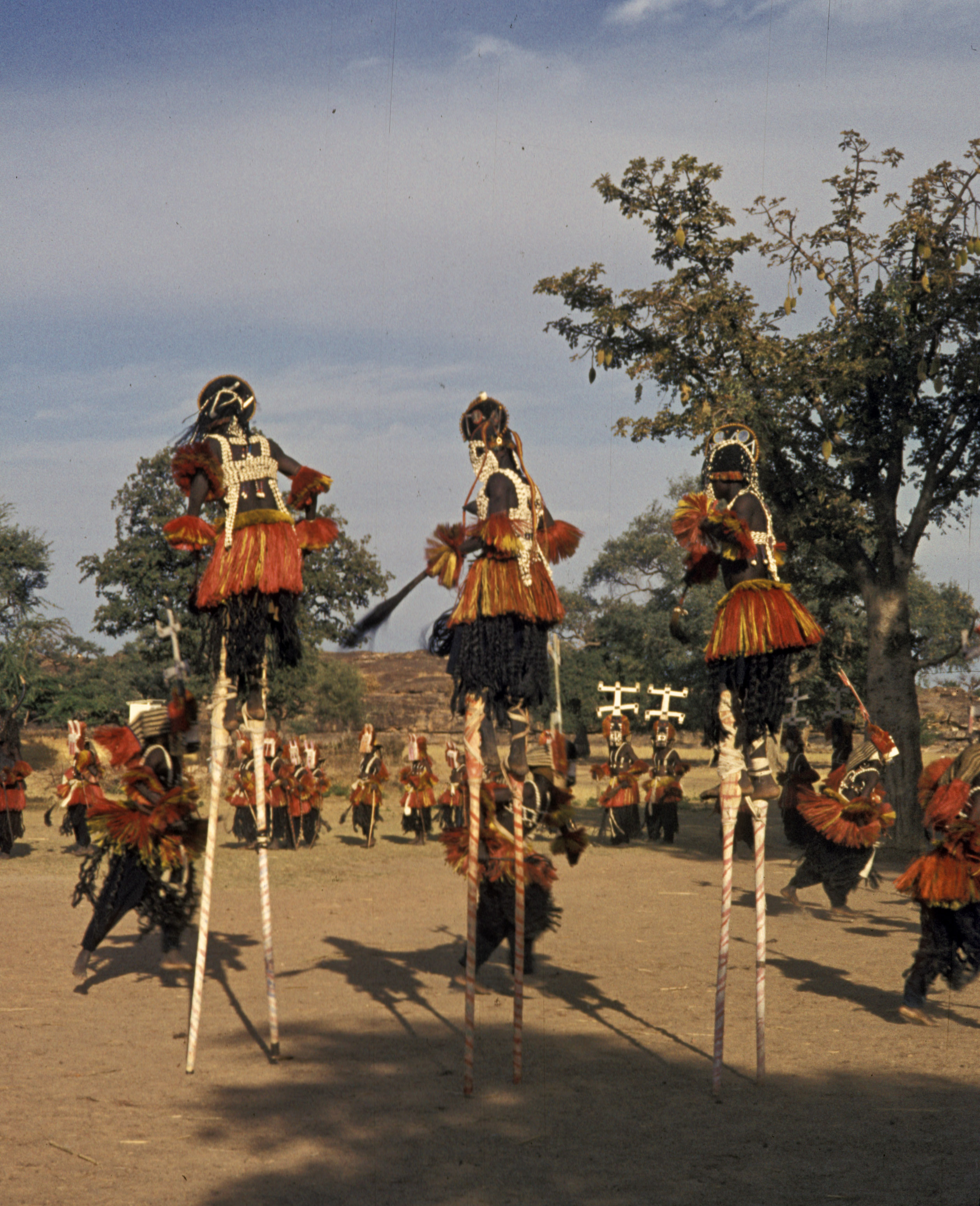 Mali